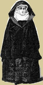 A medieval beguine and her dress